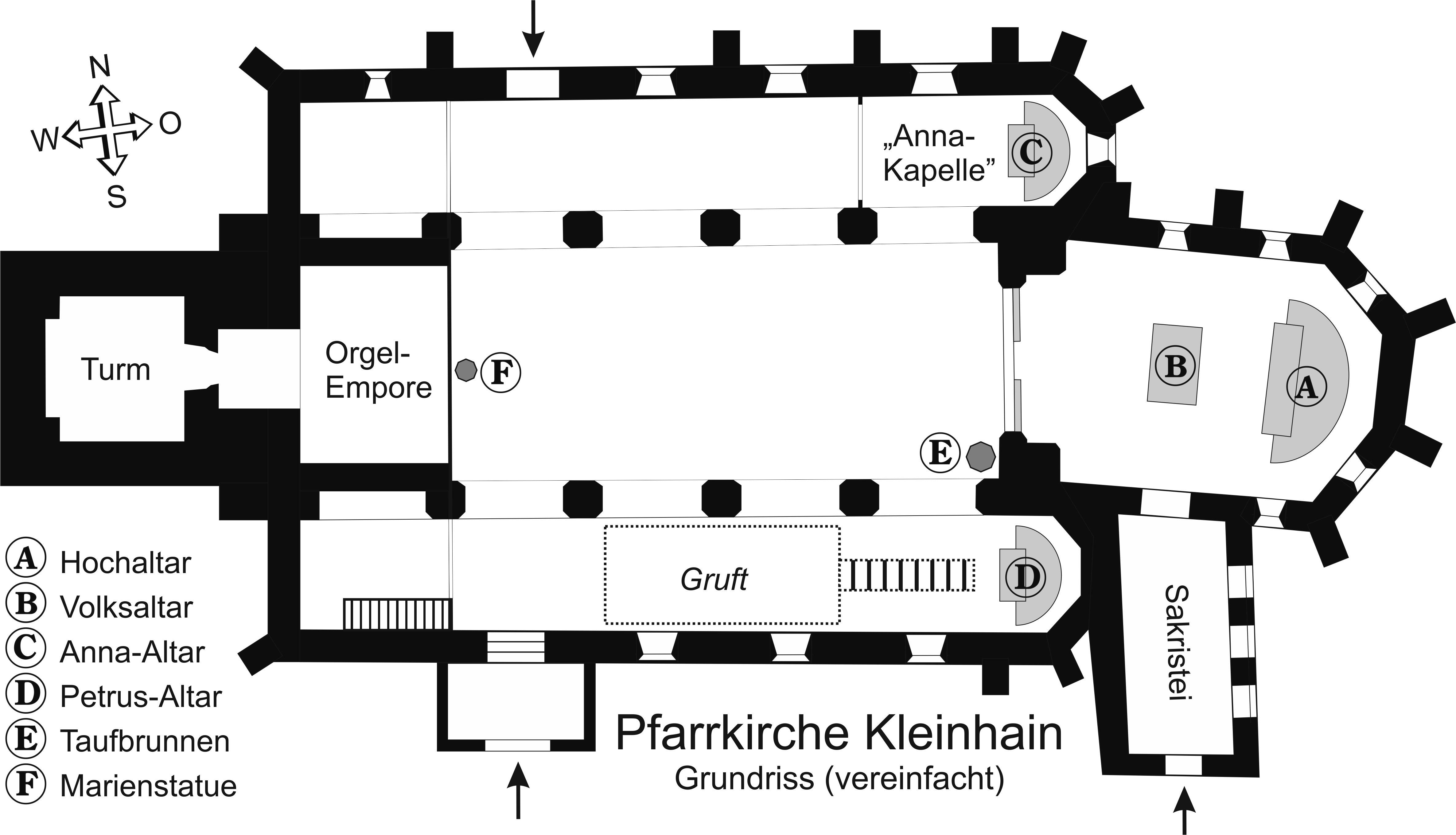 Grundriss der Pfarrkirche Kleinhain mit Beschriftung